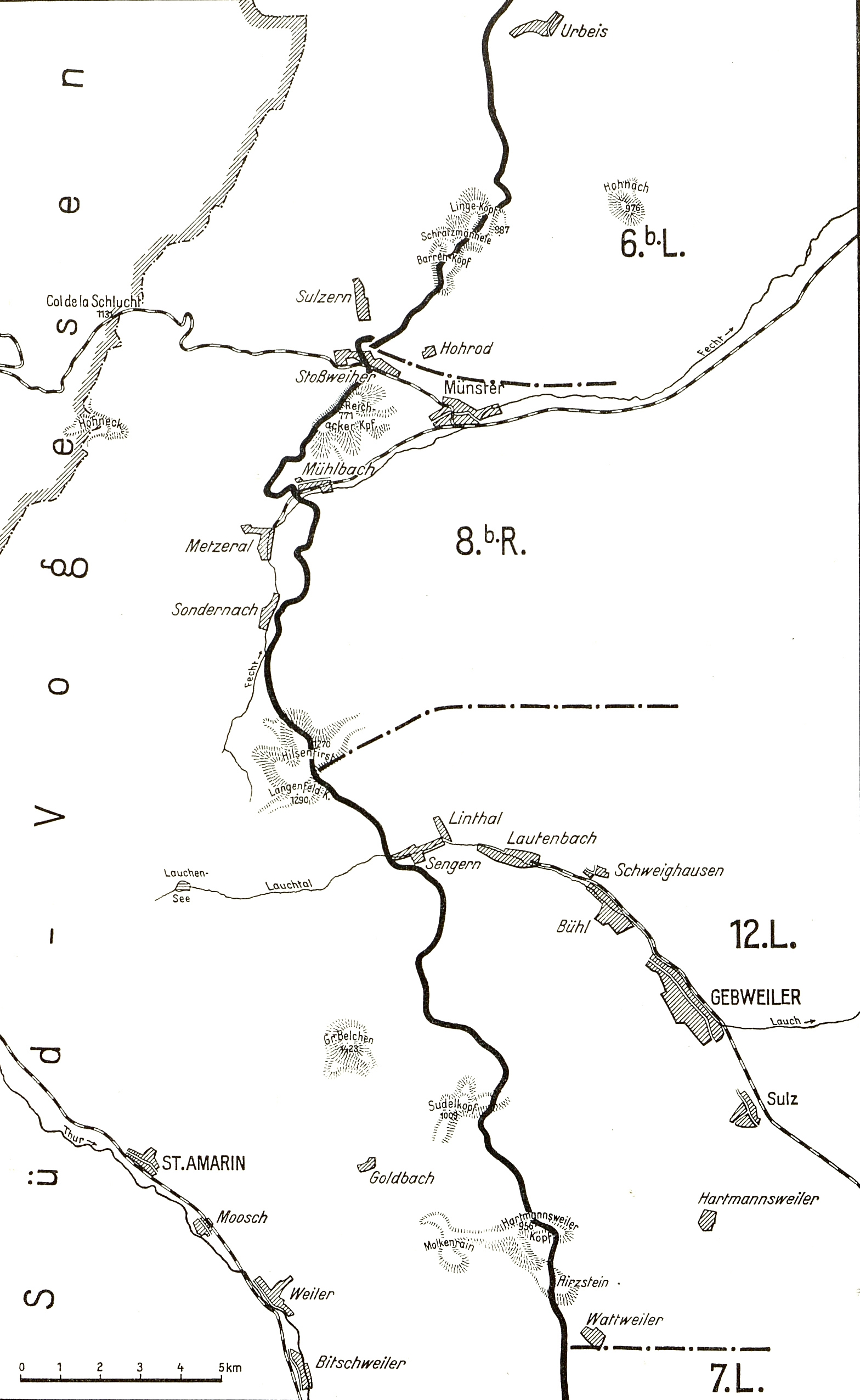 Kämpfe in den Vogesen Dezember 1915